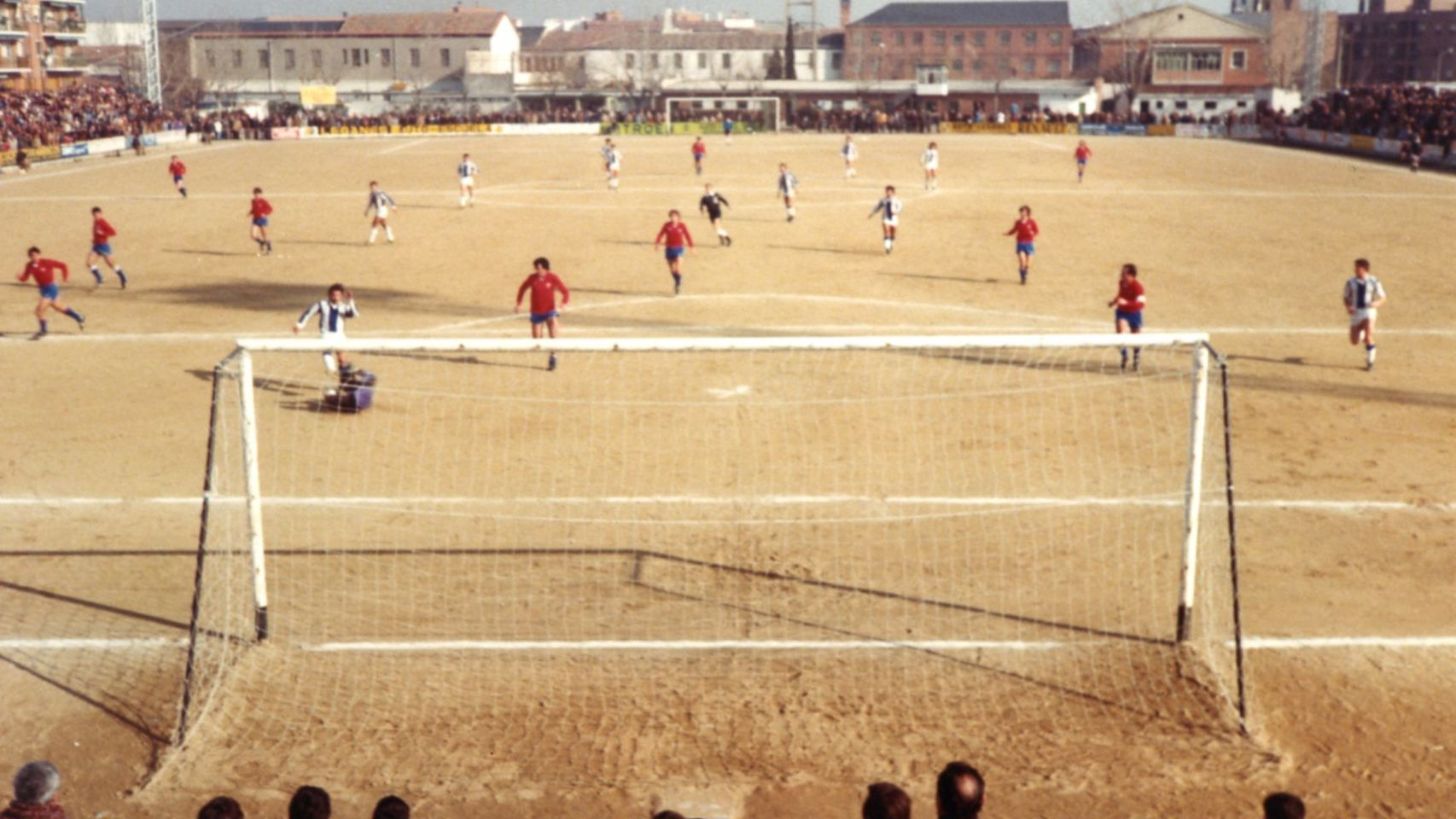 Partido del CD Leganés de los años 70 en el Luis Rodríguez de Miguel